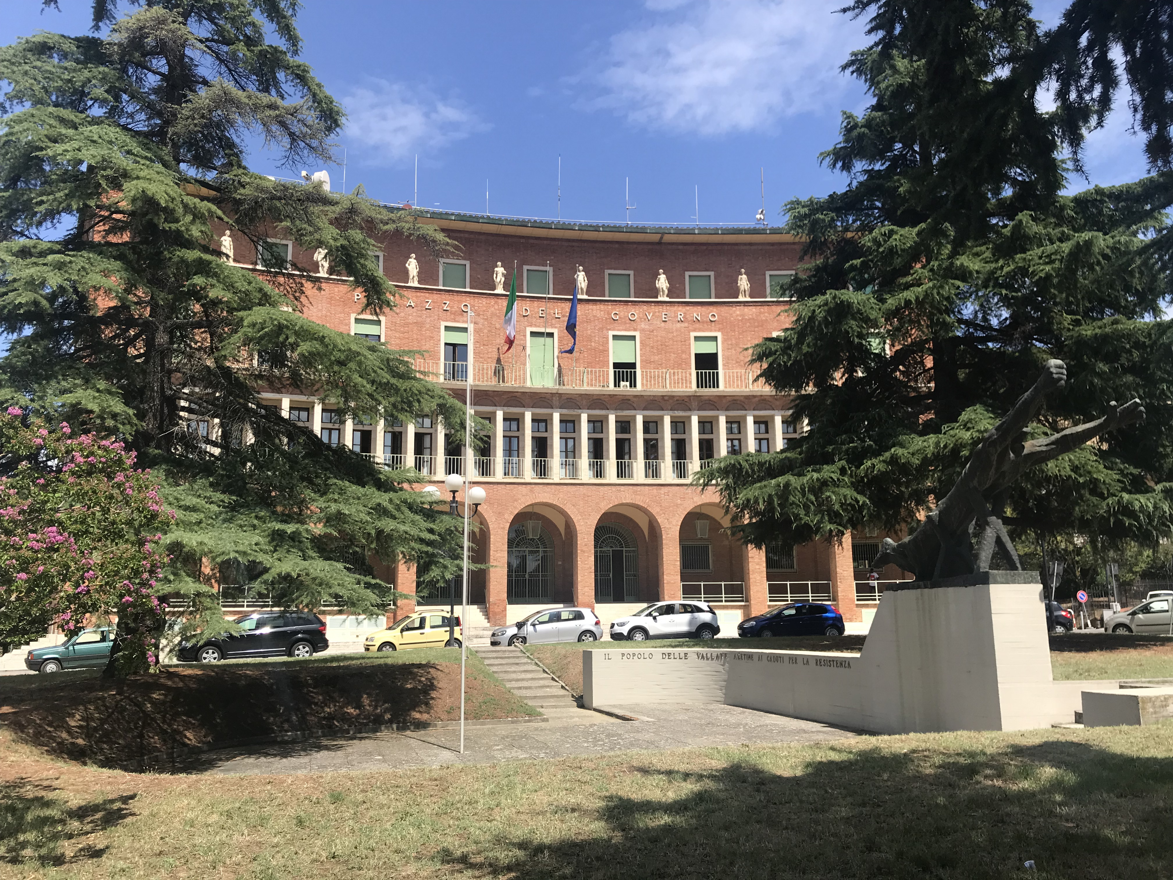 Palazzo del governo di Arezzo